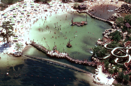 River Country en la década de los 90.